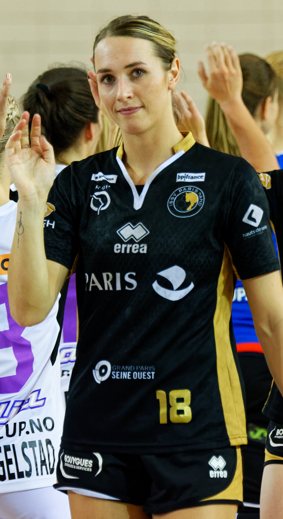 Match de coupe EHF entre Issy Paris Hand et norvégiennes de Glassverket. A Issy Les Moulineaux, le 20 octobre 2017.